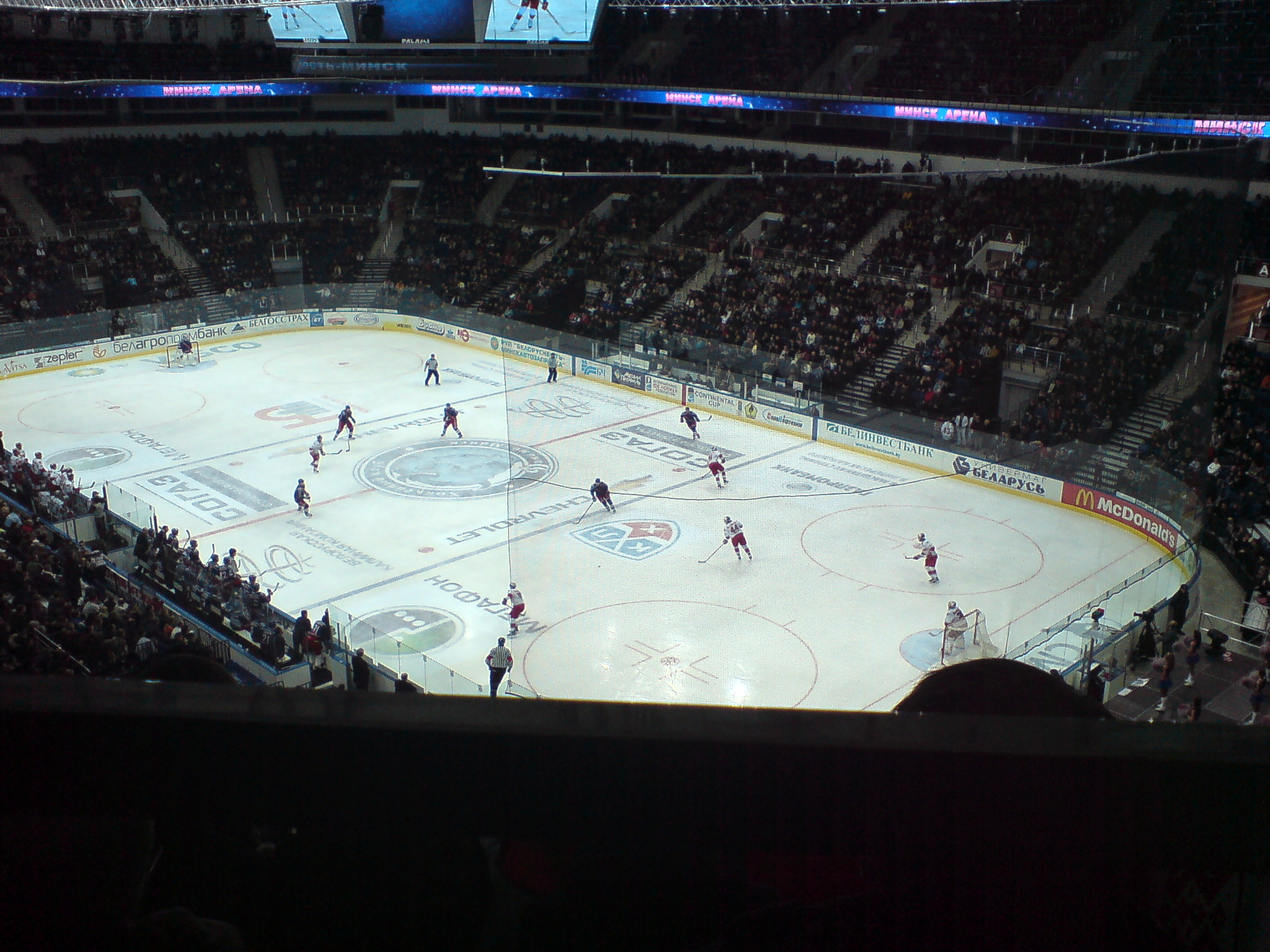 Континентальный кубок 2011, матч Юность (Минск) - Ред Булл (Зальцбуг)